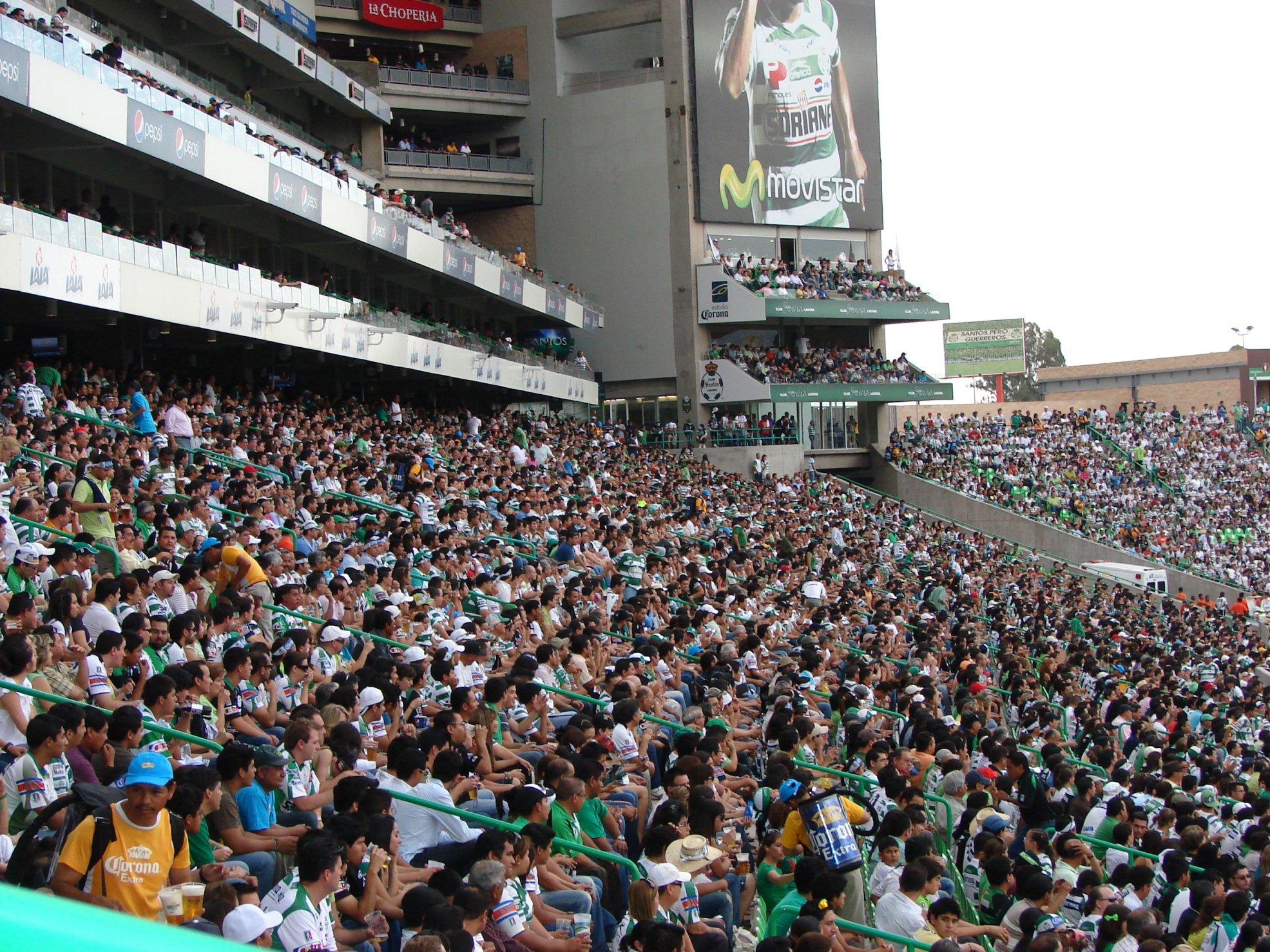 Pletórico luce el Estadio Corona de la Ciudad de Torreón, Coahuila el 15 de Mayo de 2010. Cuando doblegaron por marcador de 7 goles contra 1 a los Monarcas del Morelia en el partido de vuelta de la semifinal del torneo bicentenario en el que eliminaron al equipo purépecha por marcador global (en 2 juegos) de 10-4.